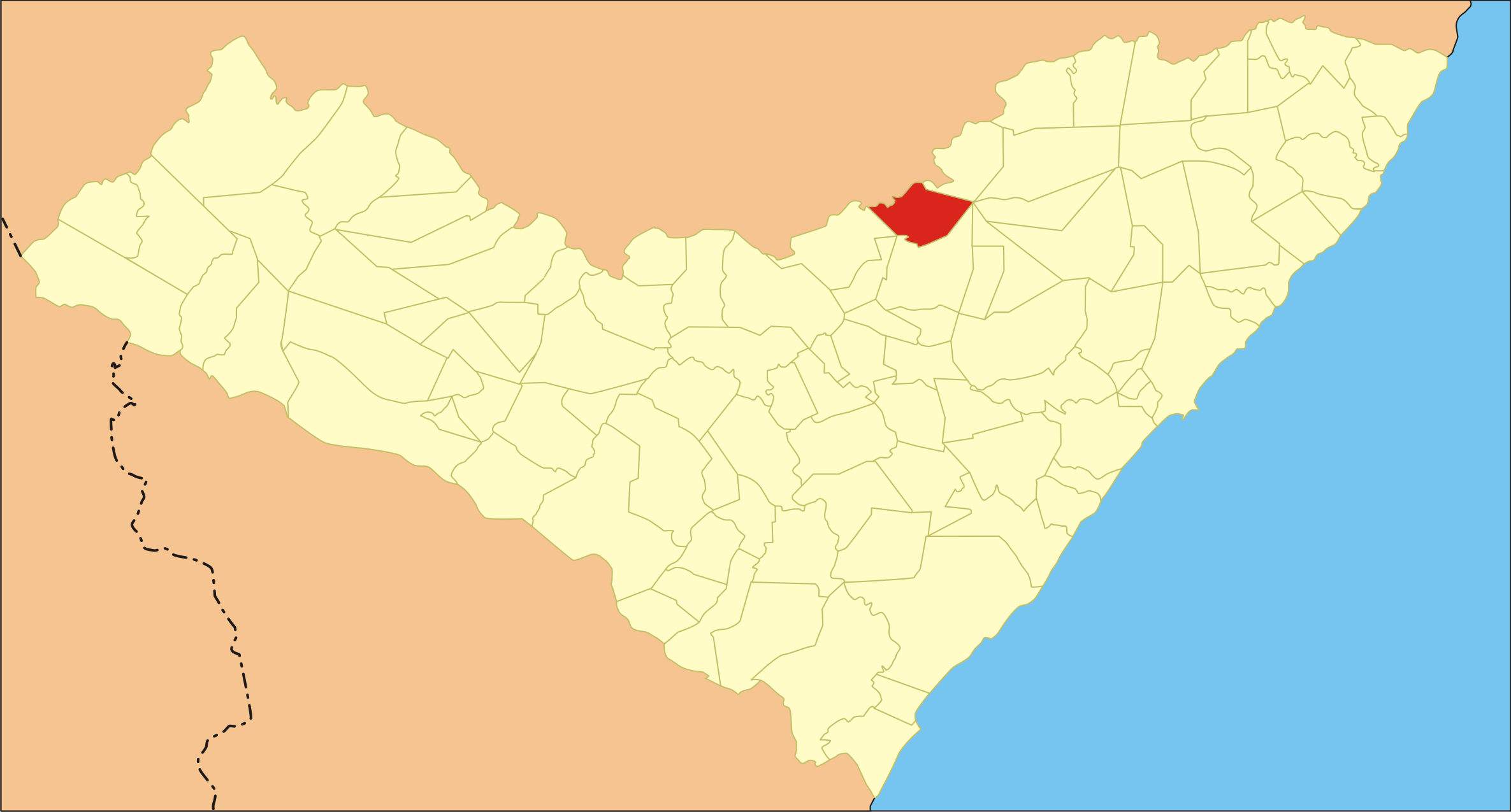 Localização da cidade em Alagoas